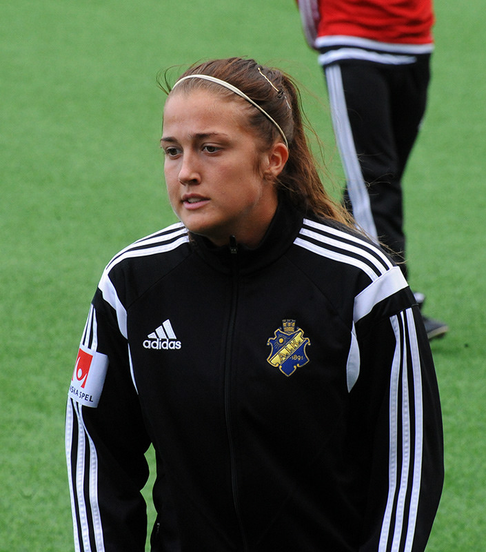 a_6_1442